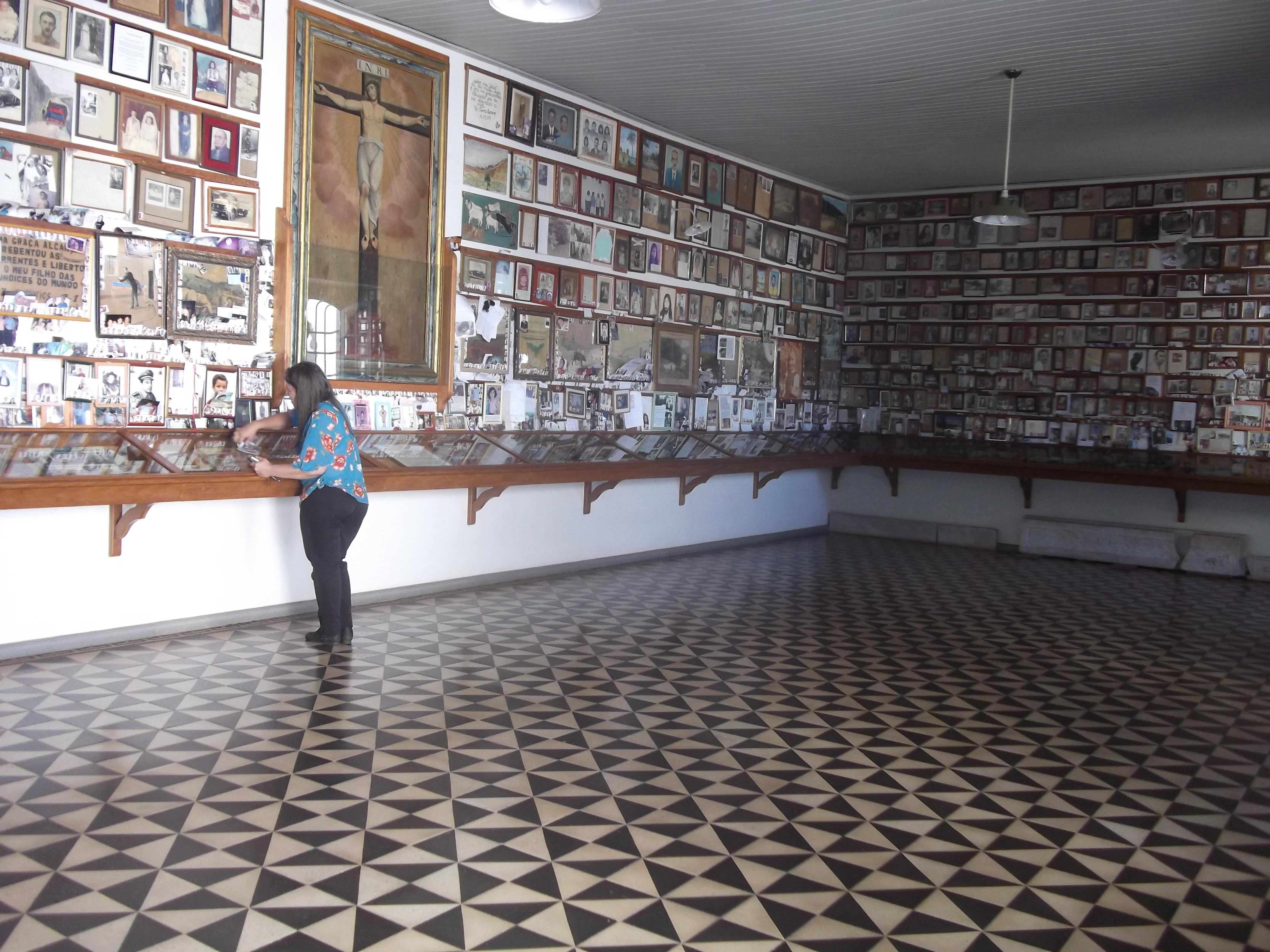 Santuário do Bom Jesus de Matosinhos